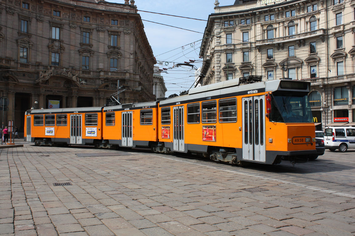 Tram articolato 4938 (serie 4900) dell'ATM di Milano in piazza Cordusio.